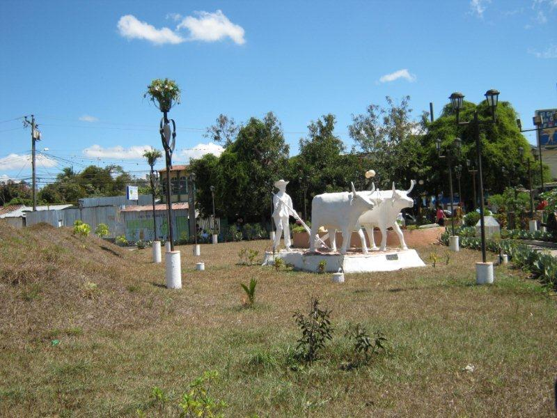 Danli